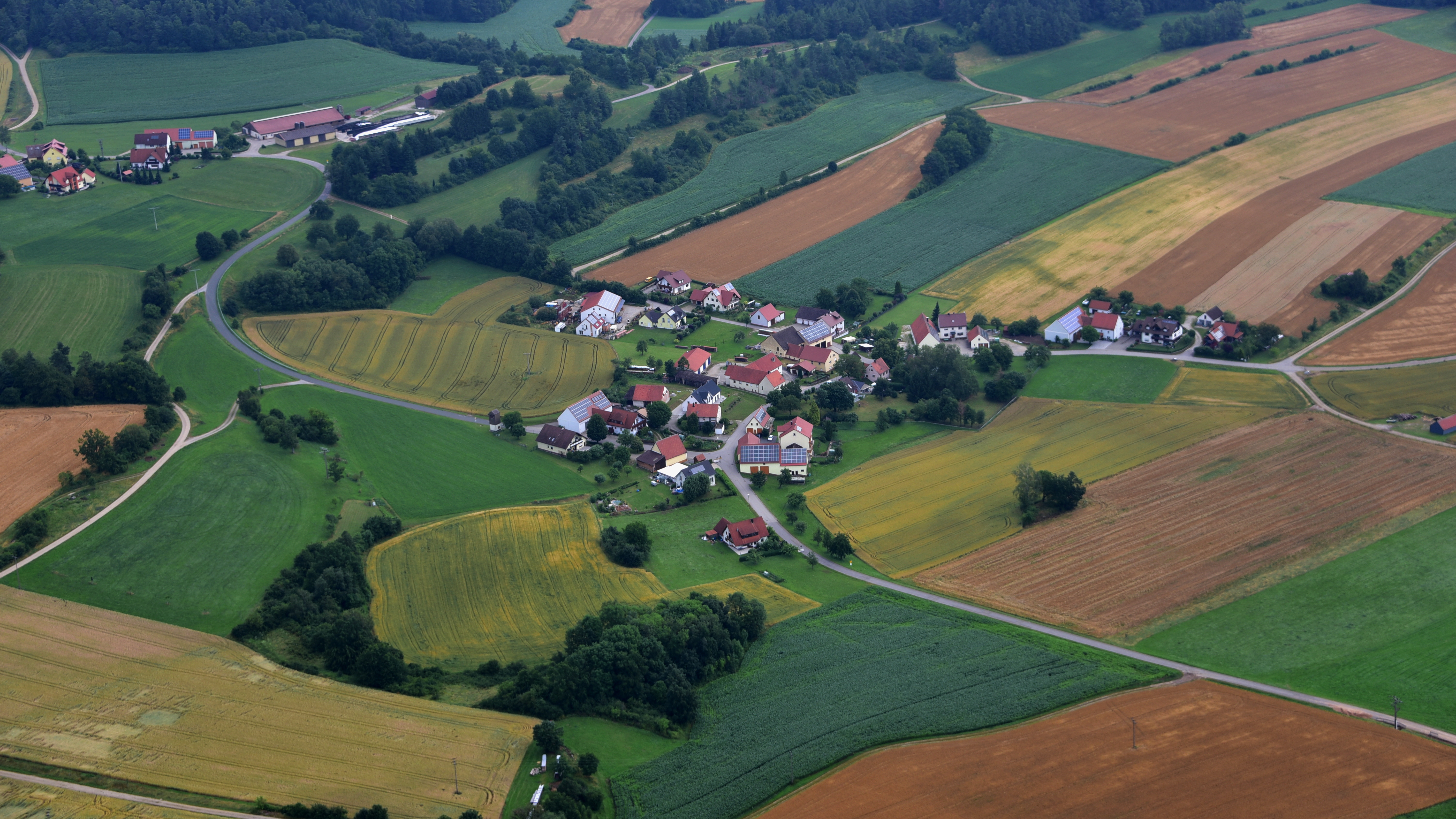 Seiboldstetten, Luftaufnahme (2016)